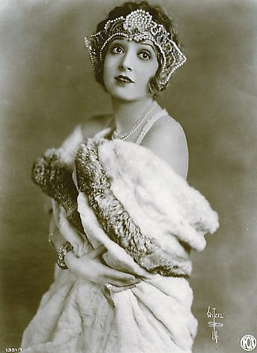 Madge Bellamy